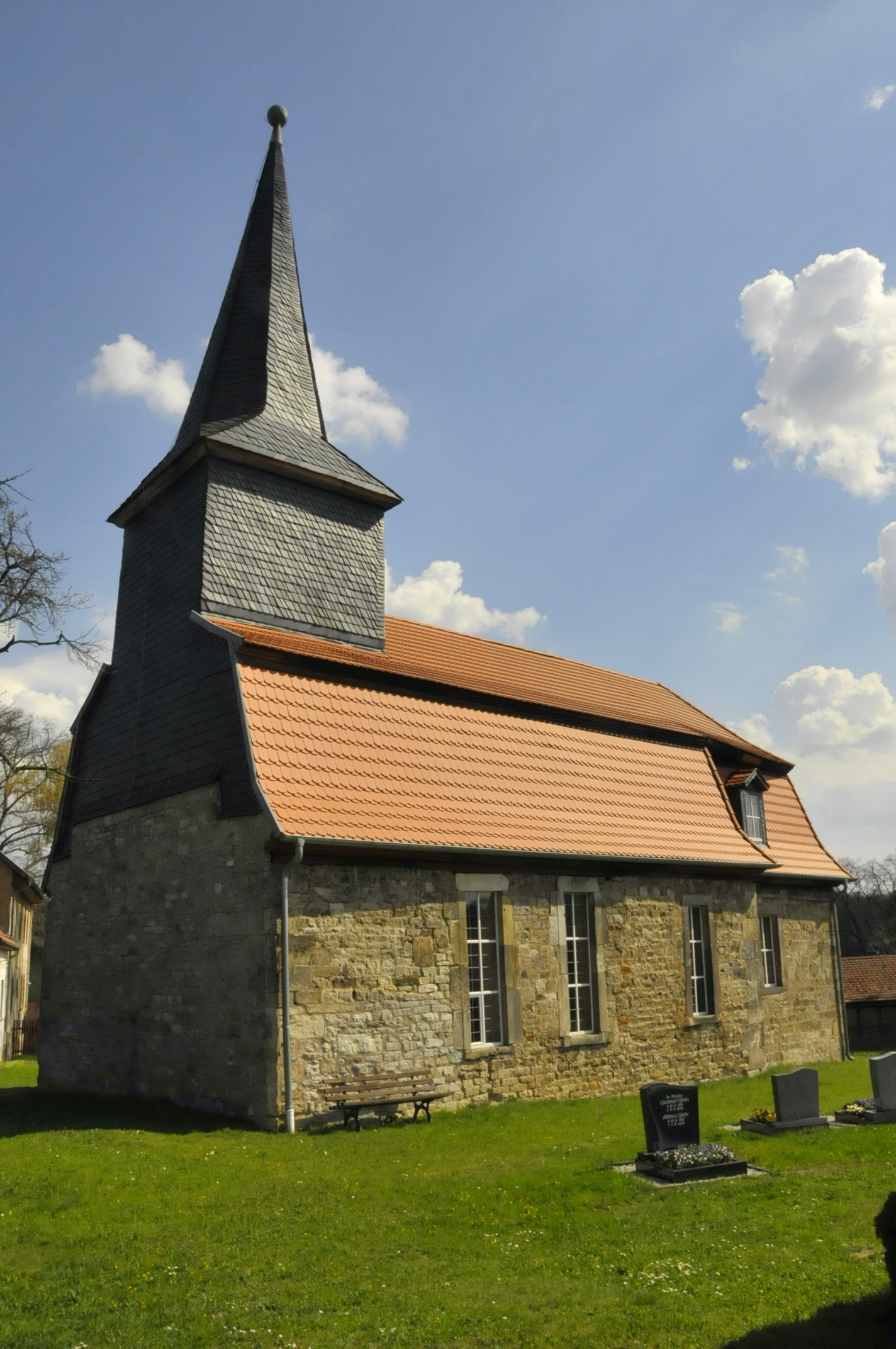 Görbitzhausen, Kirche